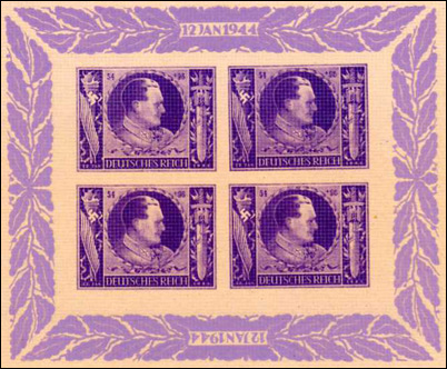 Private Fälschung eines Briefmarkenblocks mit dem Abbild Görings. Gedruckt unmittelbar nach Ende des 2. Weltkriegs von unbekanntem Fälscher.